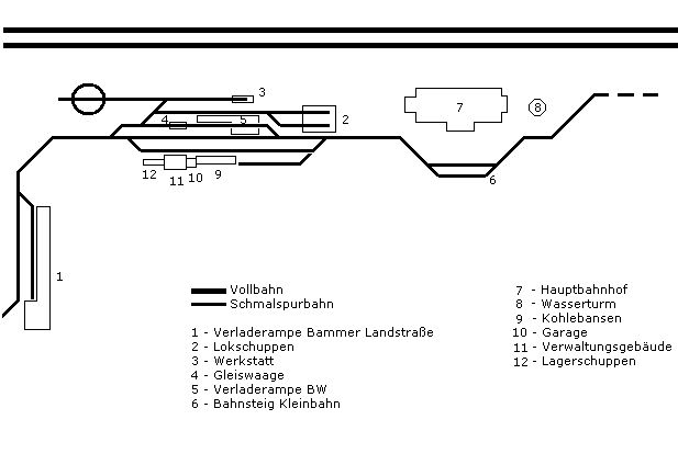 Glp RN Original